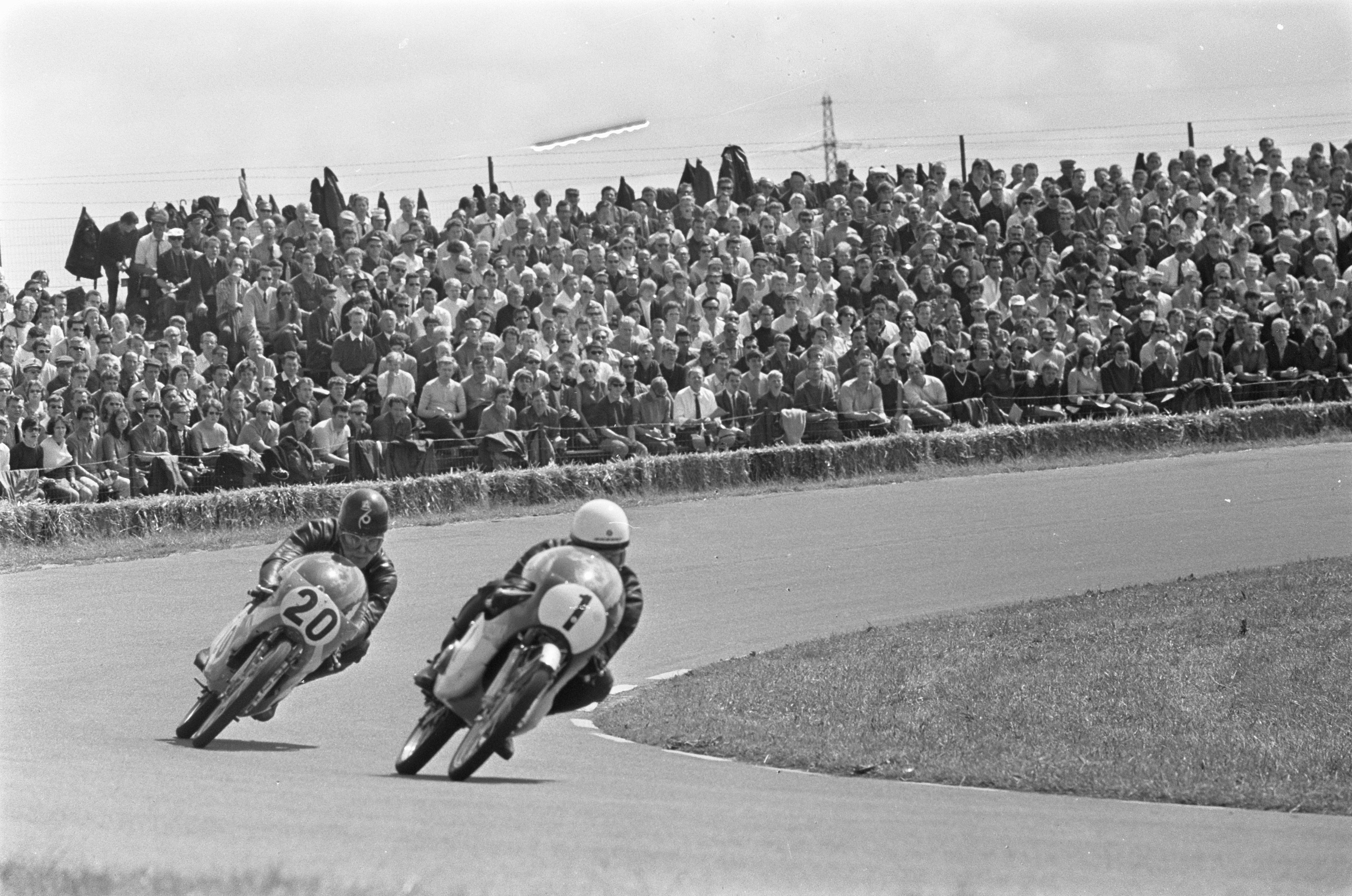 Collectie / Archief : Fotocollectie Anefo Reportage / Serie : TT Assen 1968 Beschrijving : TT-races te Assen. De 50cc. Paul Lodewijkx (20) in duel met Anscheidt (1) Datum : 30 juni 1968 Locatie : Assen Trefwoorden : motorsport Persoonsnaam : Anscheidt, Hans-Georg, Lodewijkx, Paul Fotograaf : Nijs, Jac. de / Anefo Auteursrechthebbende : Nationaal Archief Materiaalsoort : Negatief (zwart/wit) Nummer archiefinventaris : bekijk toegang 2.24.01.05 Bestanddeelnummer : 921-4758